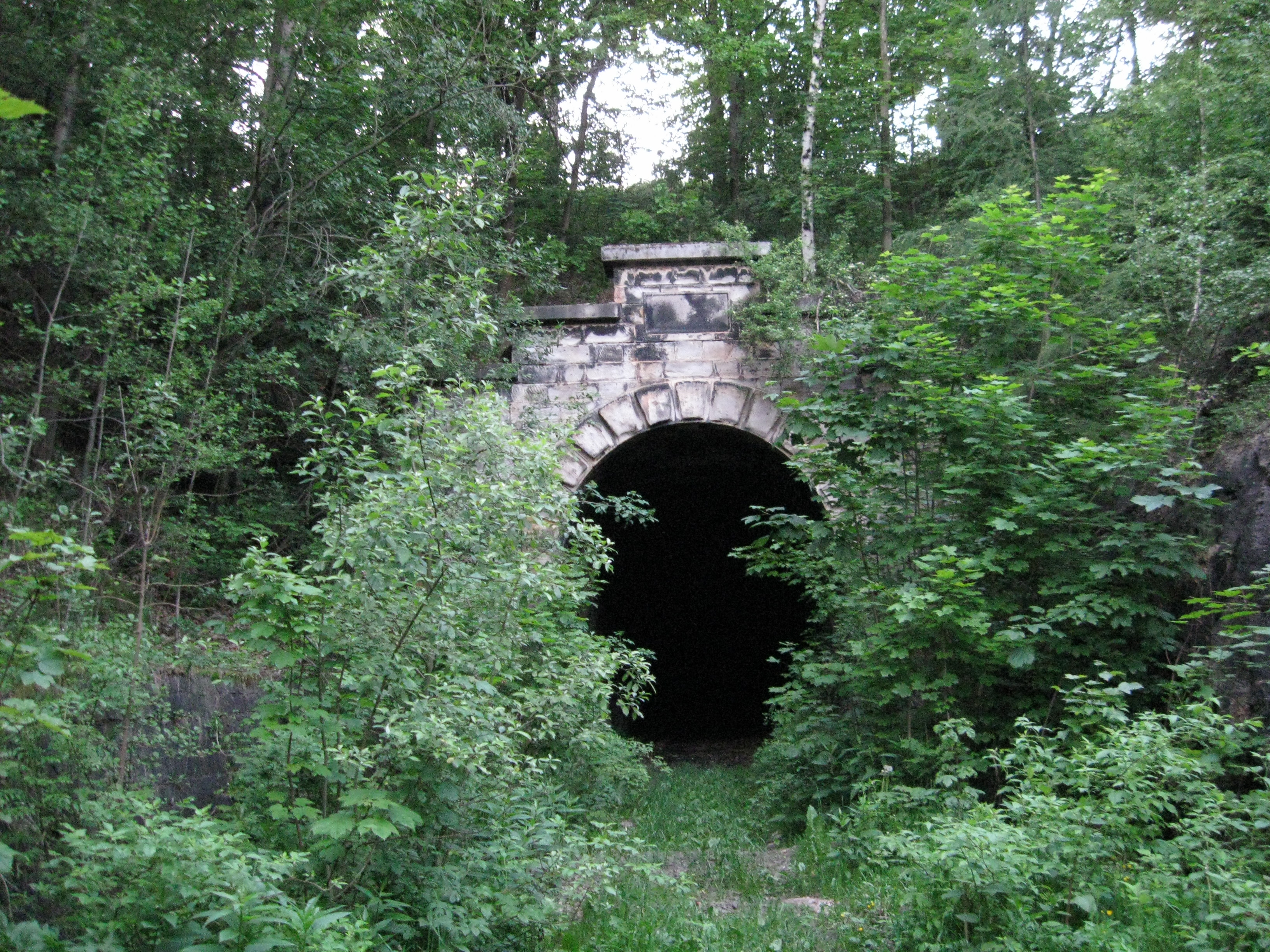 Tunel pod Małym Wołowcem, widok od strony Jedliny Zdroju (część nieczynna)